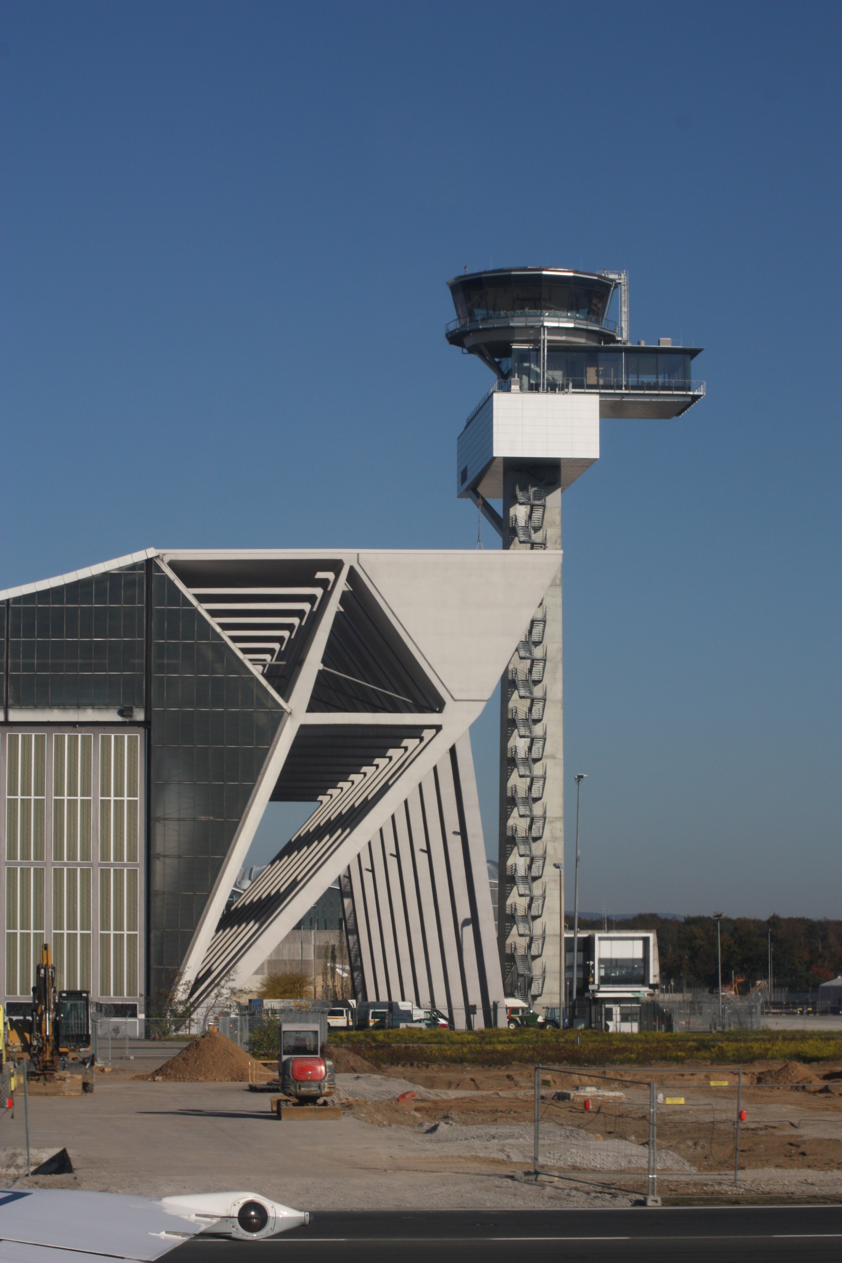 Frankfurt Airport Oktober 2010